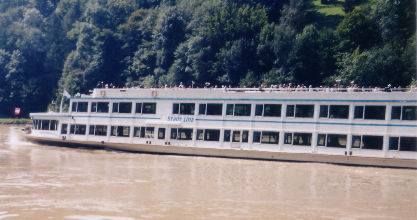 Wurm und Köck Donauausflugsschiff